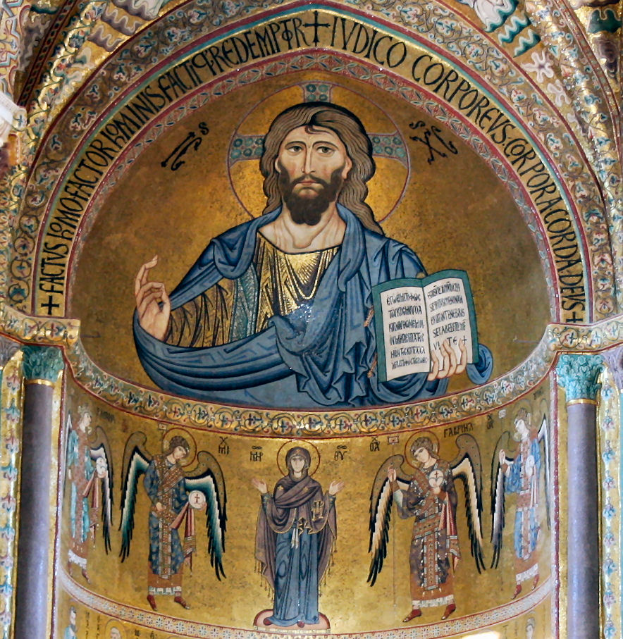 Cefalu- Dom Christusmosaik